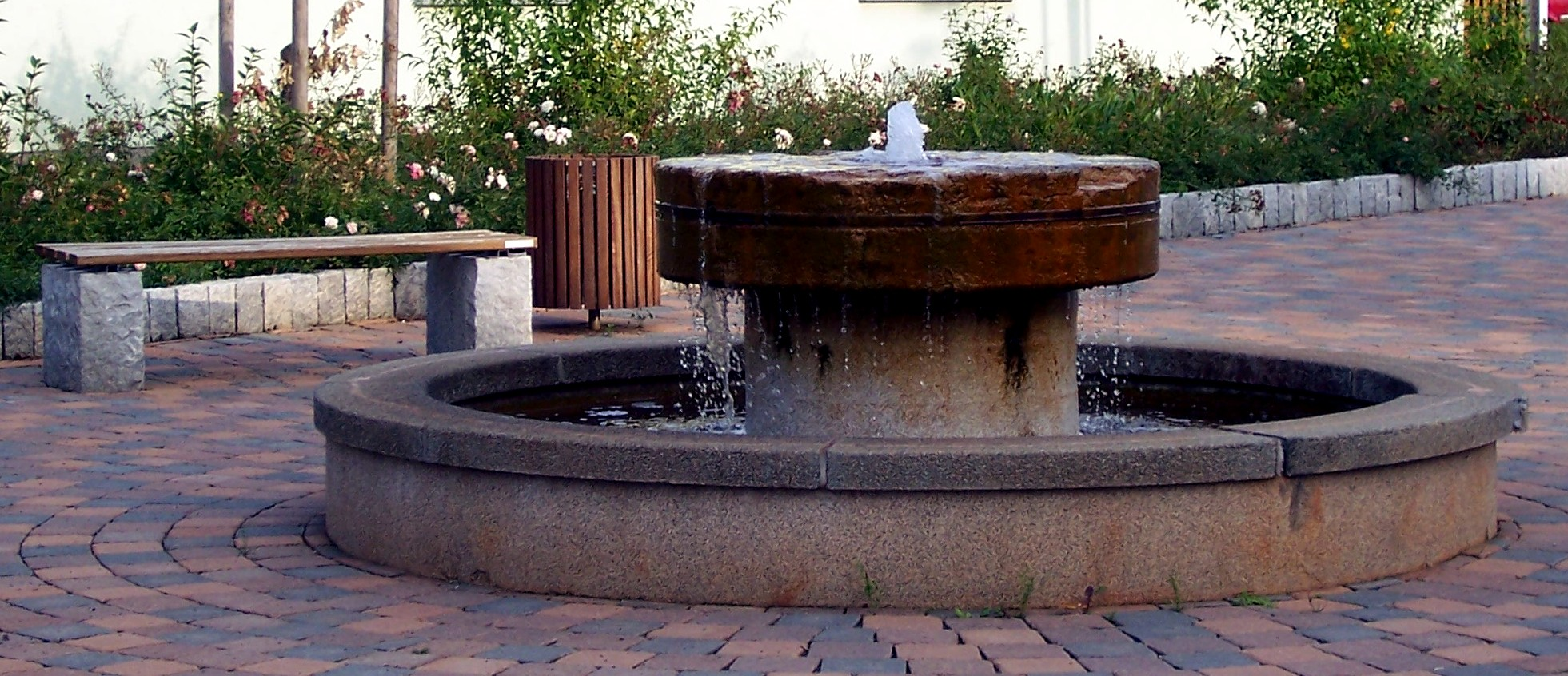 Brunnen mit originalem Mühlstein, Elstertrebnitz OT Trautzschen (Deutschland)